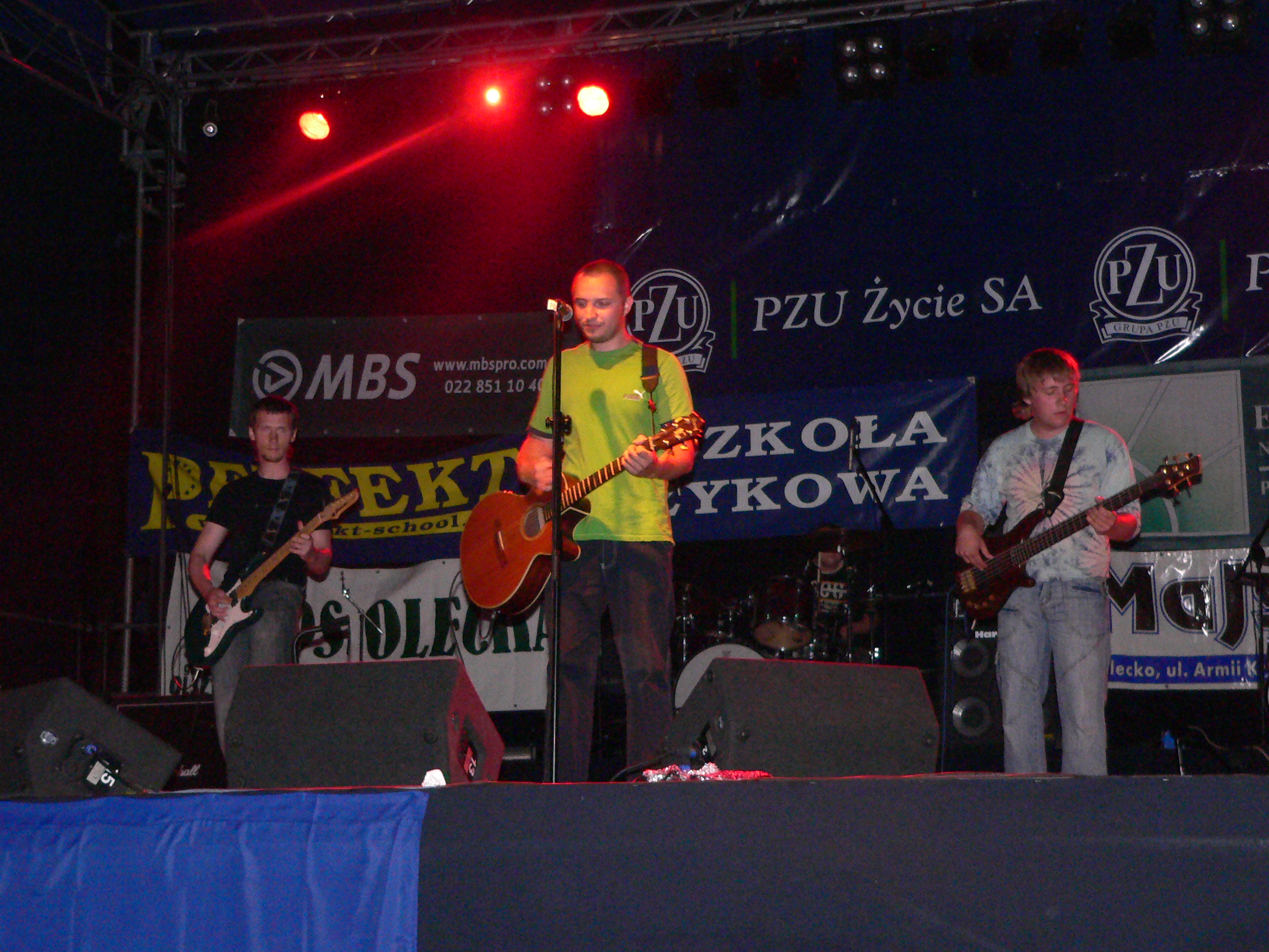 Гурт beZ bileta спявае на фестывалі “Fiesta Borealis” у 2006 годзе.